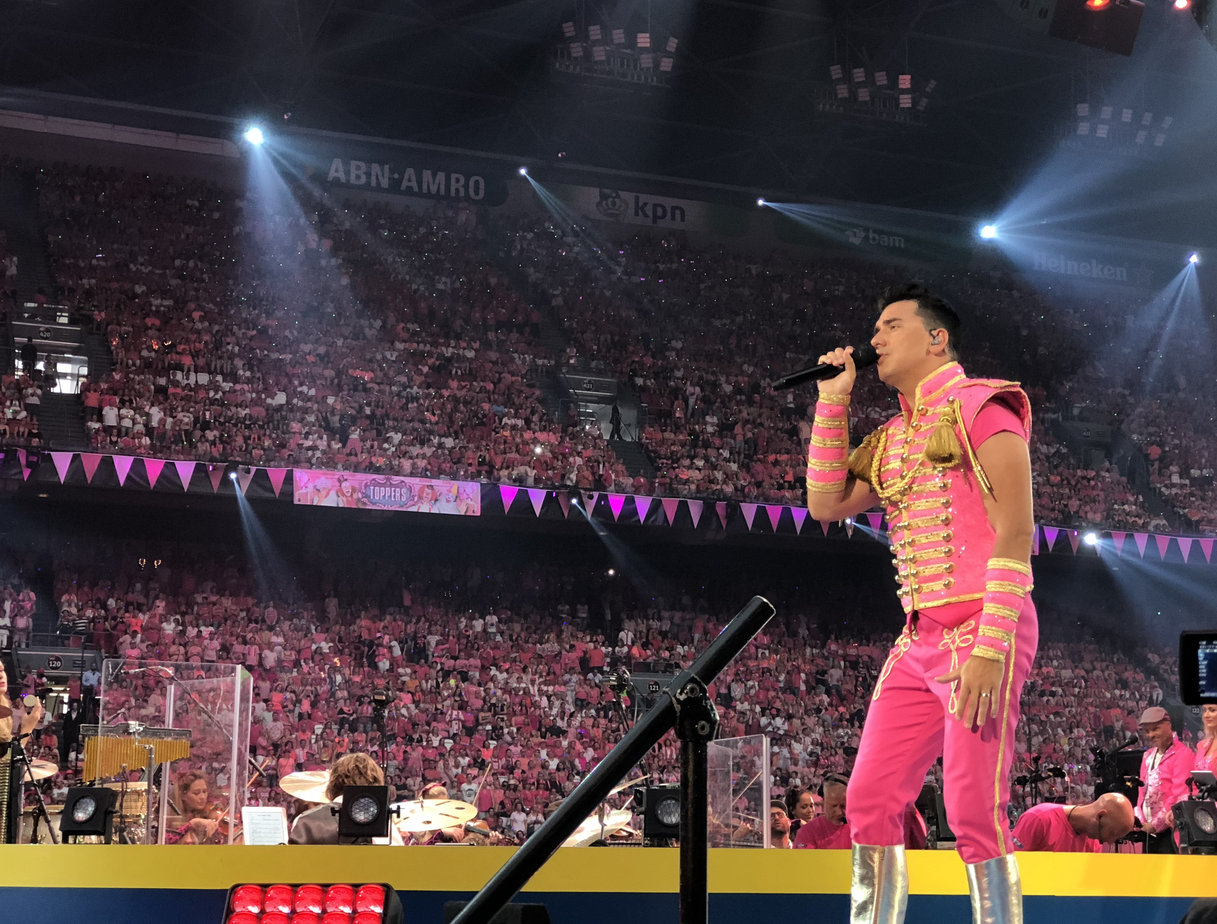 Toppers in Concert 2018